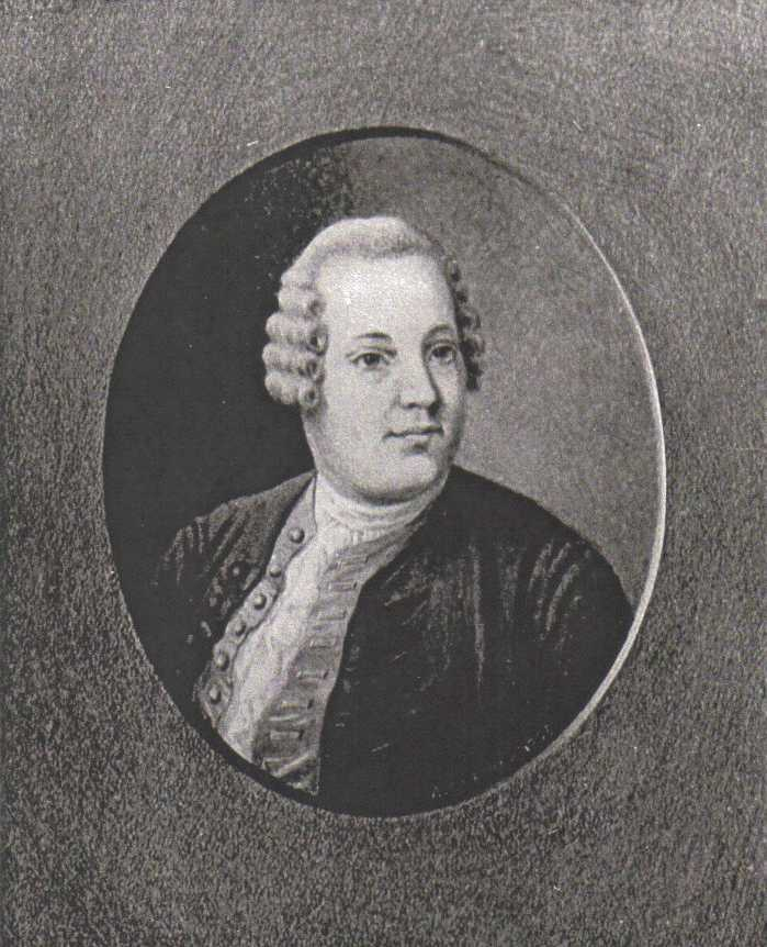 Georg Friedrich Spitzner, Amtmann in Reichenbach, ab 1741 Kreisamtmann in Schwarzenberg